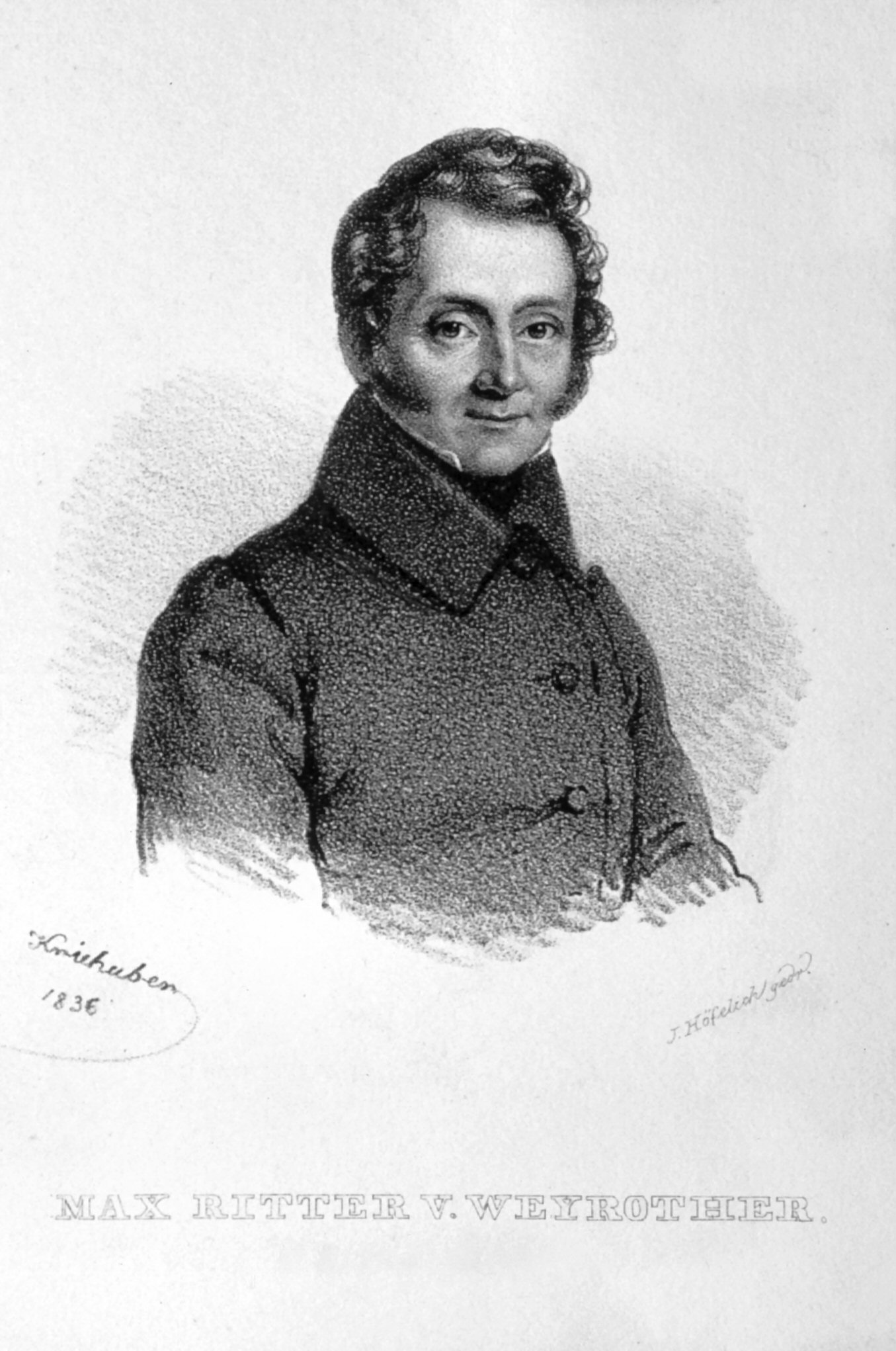 Maximilian Ritter von Weyrother (1783-1833) k. k. Hofbereiter Lithographie von Josef Kriehuber, 1836